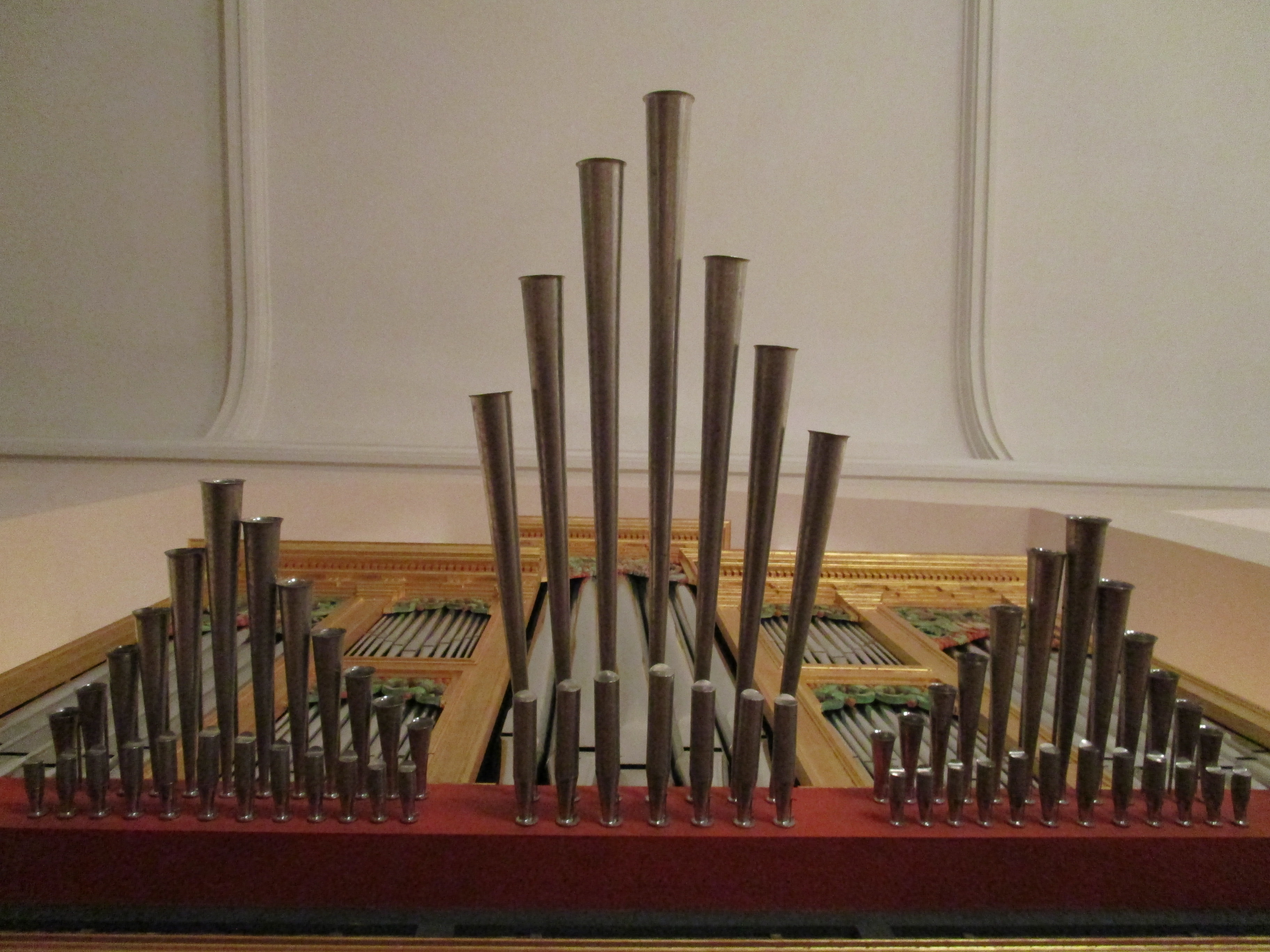 Die Neustädter Hof- und Stadtkirche St. Johannis bekam im Jahr 2019 zusätzlich zur Spanischen Orgel von 2001 (s. auch Spanische Trompete eine neue Orgel (siehe Orgeln der Neustädter Kirche (Hannover)). Beide Orgeln stehen im Eigentum des Landes Niedersachsen, denn sie sind von Bund und Land je zur Hälfte finanzierte Instrumente zur Ausbildung von Studentinnen und Studenten des Studiengangs Kirchenmusik der Hochschule für Musik, Theater und Medien Hannover. Nach dem zwischen Land Niedersachsen und Kirchengemeinde geschlossenen Vertrag steht die 2019 entstandene Thomas-Orgel der Musikhochschule 40 Stunden in der Woche für die Ausbildung der Studierenden zur Verfügung. Die neue Orgel wurde am 26. Oktober 2019 von Orgelprofessor Emmanuel Le Divellec (Musikhochschule Hannover) mit einem reinen Programm von Orgelmusik von Johann Sebastian Bach der Öffentlichkeit vorgestellt.